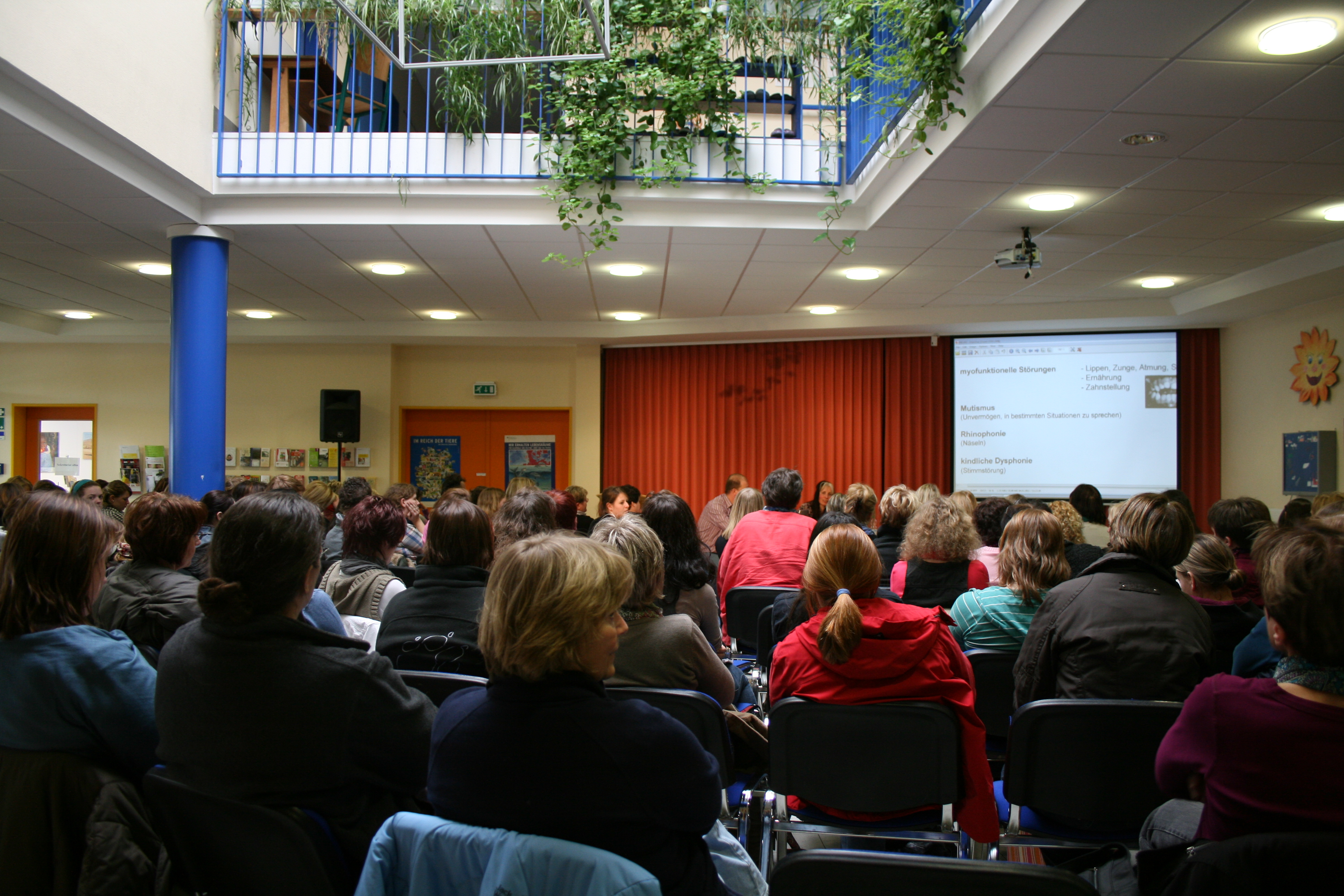 Gemeinsame Fortbildungen von Erzieherinnen und Grundschullehrkräften: Im März 2011 ging es um "Sprachförderung in Kindergarten und Grundschule"